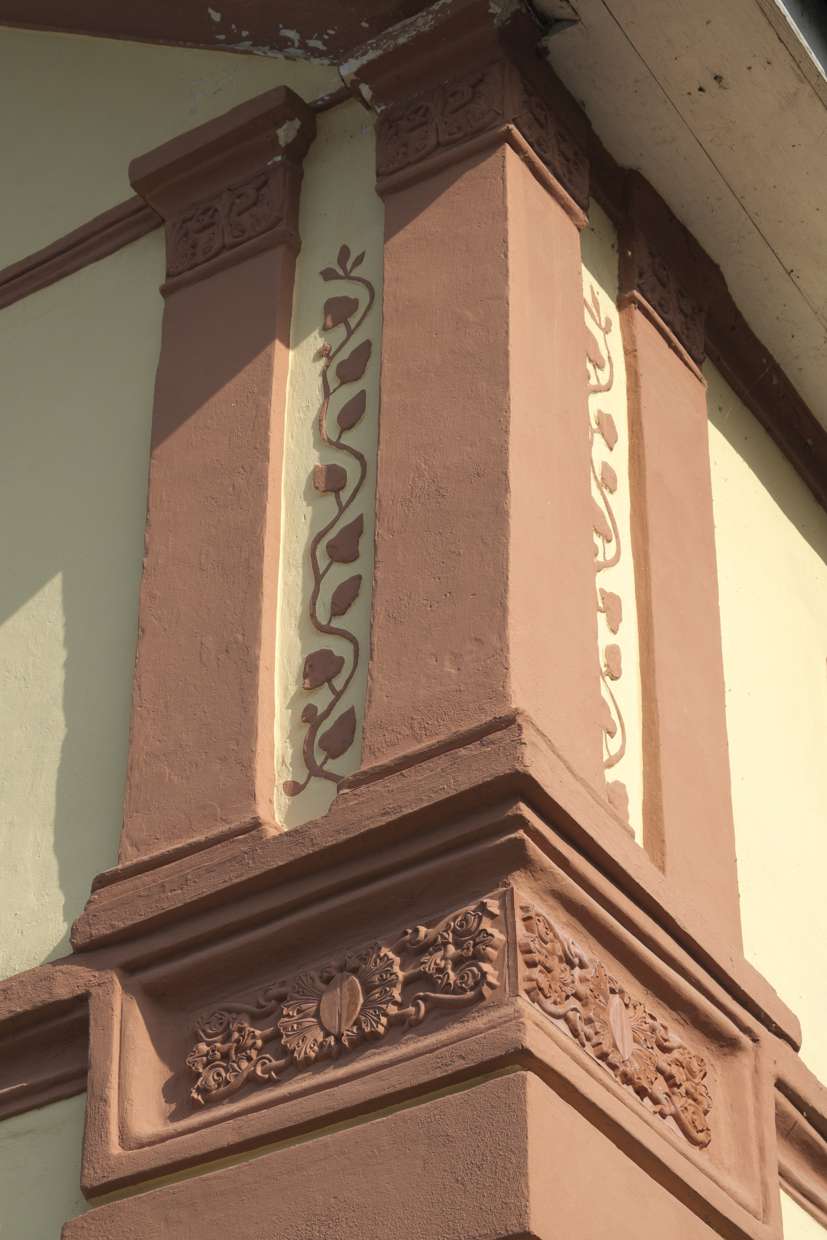 Wohnstallhaus, Dorfstraße 1, in Grucking (Fraunberg) im Landkreis Erding (Bayern/Deutschland)